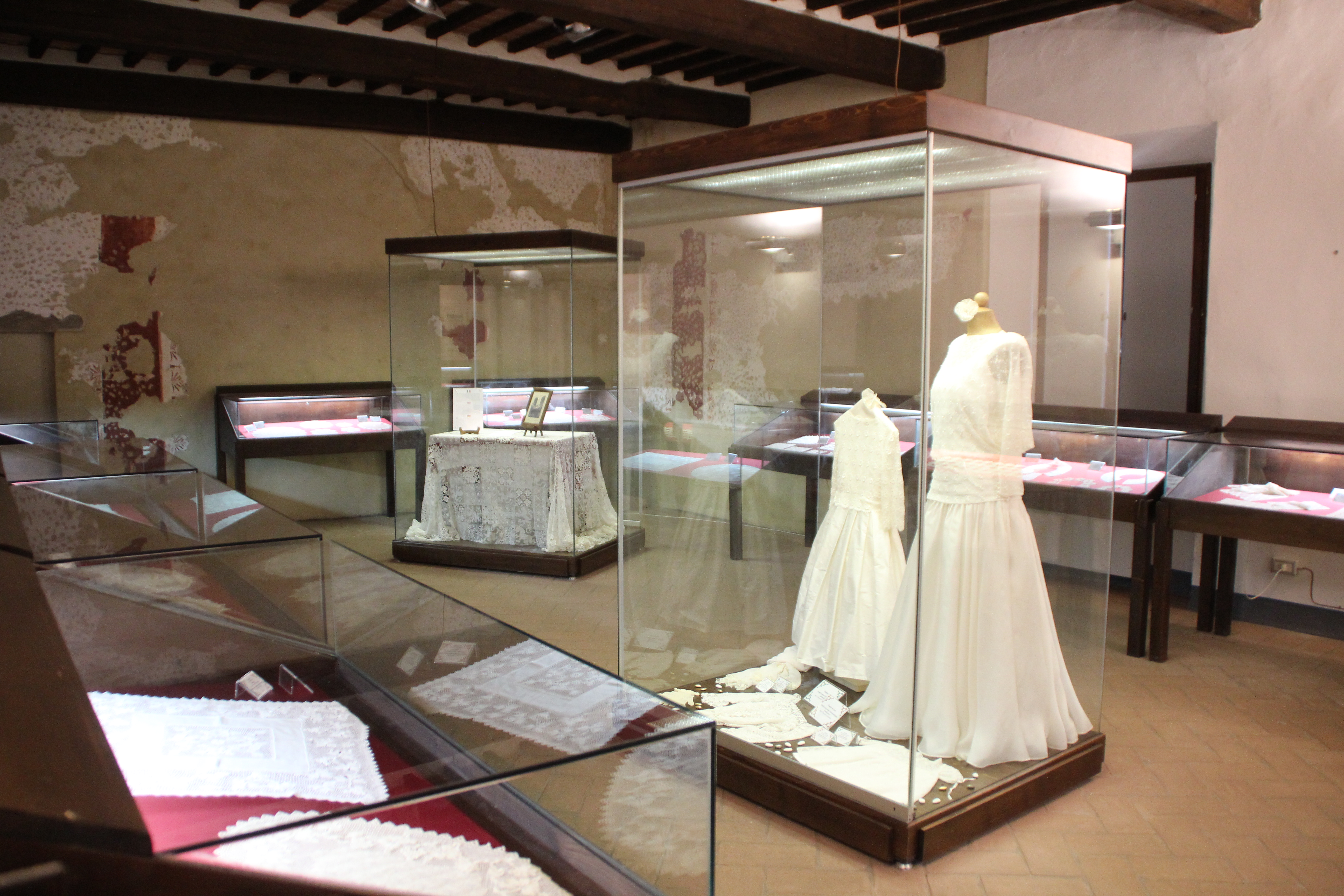 Isola Maggiore Museo Merletto